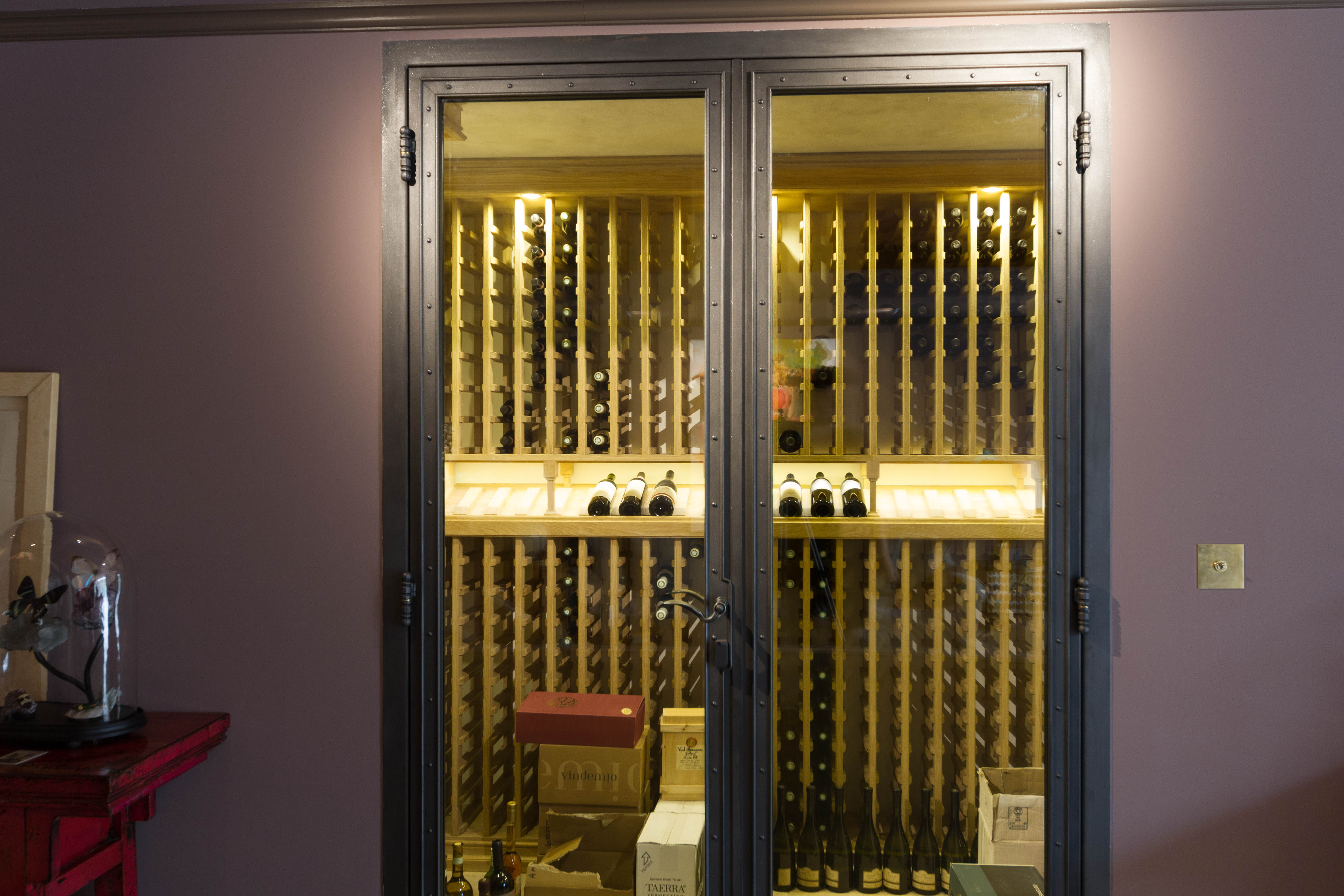 Menší vinný sklep, který pojme až 550 lahví vína